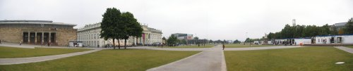 Panorama vom Vorplatz der documenta, Fridericianum Erstellt von Magnus Manske, Lizenz : Public Domain